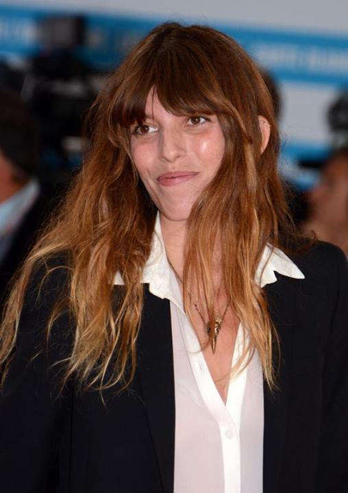 Lou Doillon au festival de Deauville